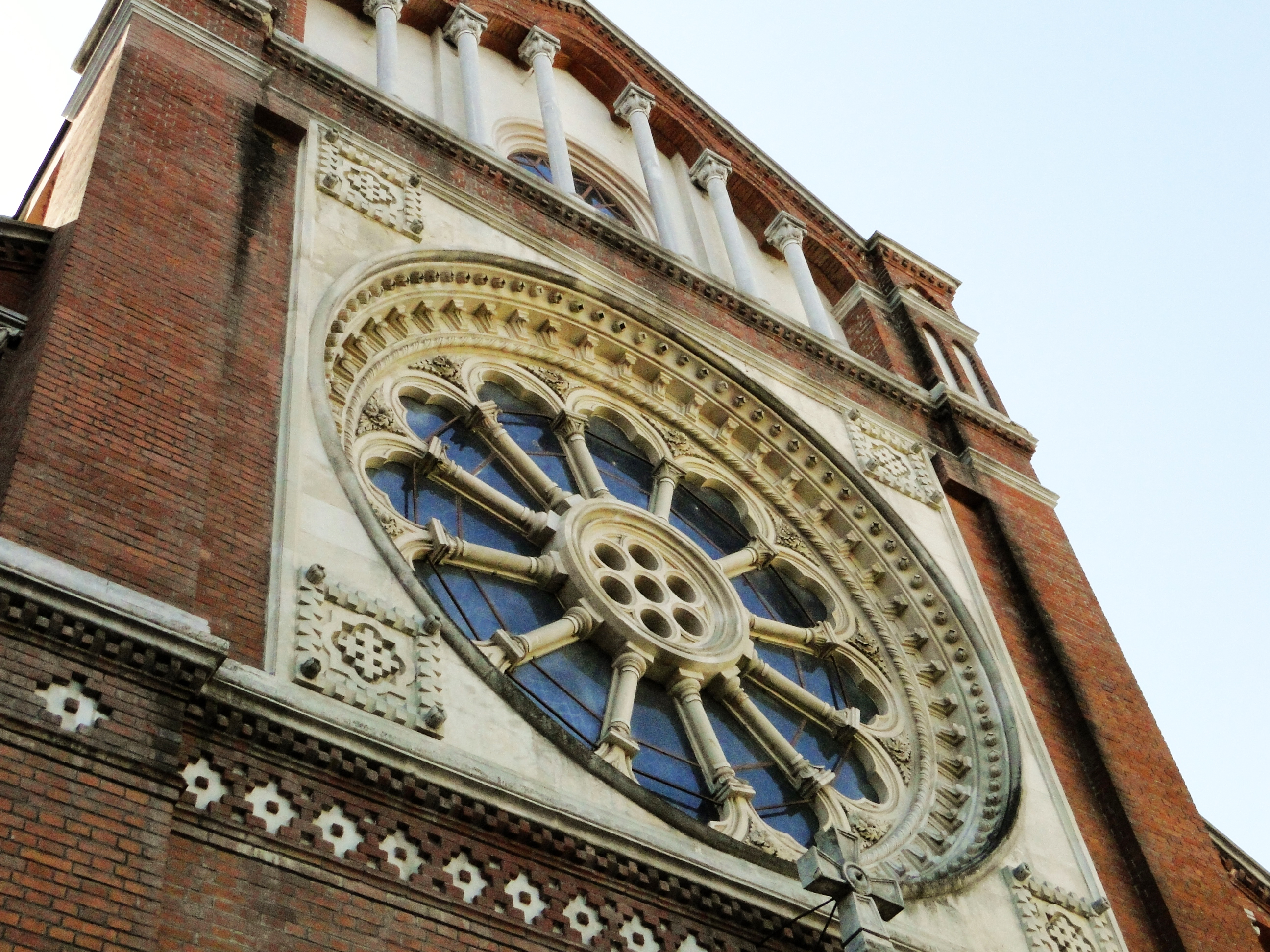 Catedrala romano-catolică „Sf. Iosif“